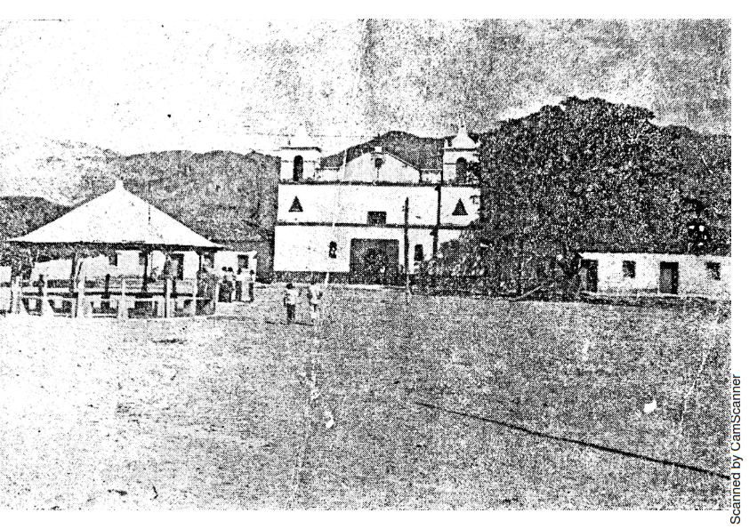 Fotografia del Centro de la Población de San Antonio del Norte, inicio de la decada de los 80´s